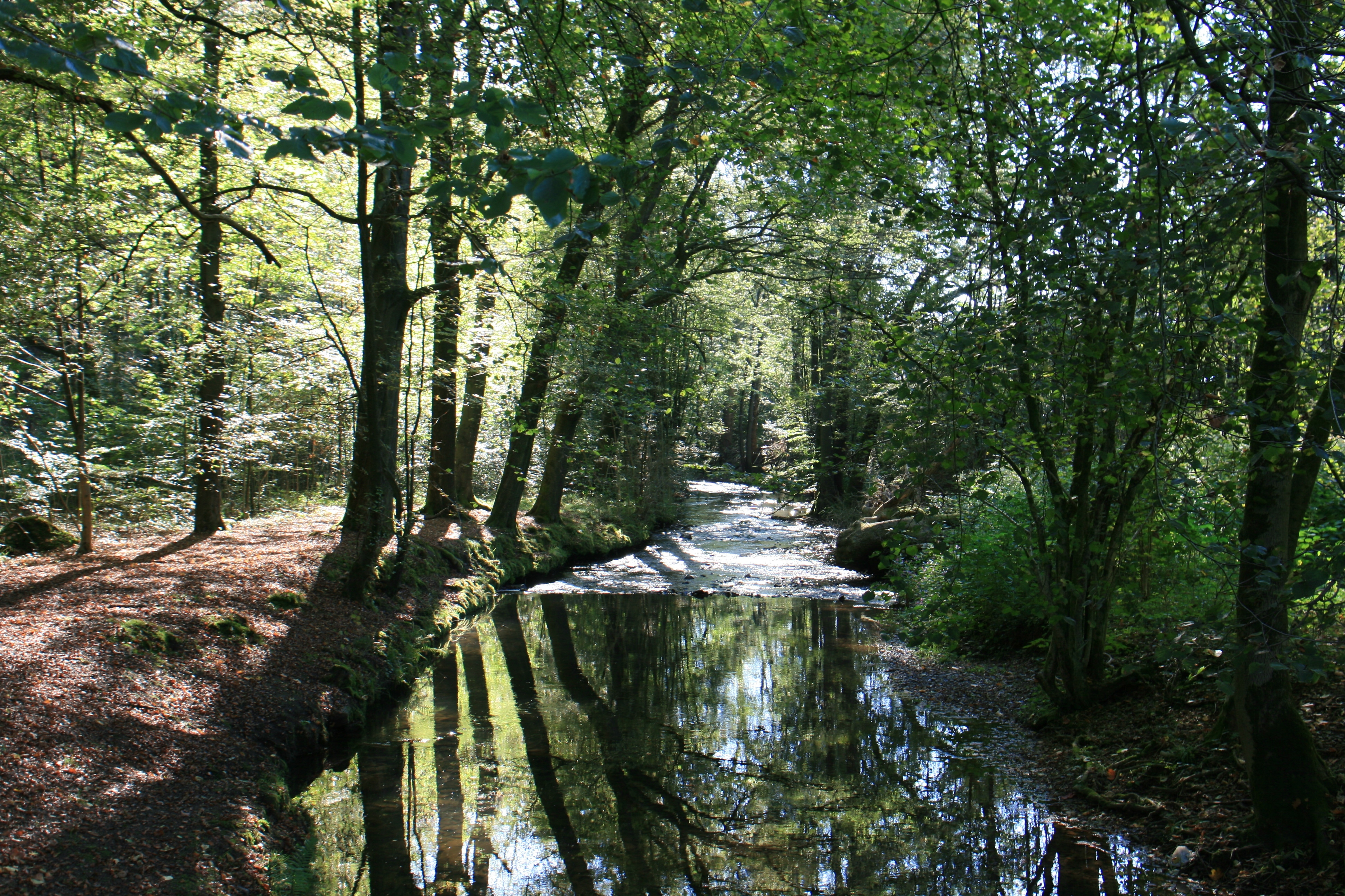 Die Leppe am Oelchensweg in Bickenbach, Engelskirchen